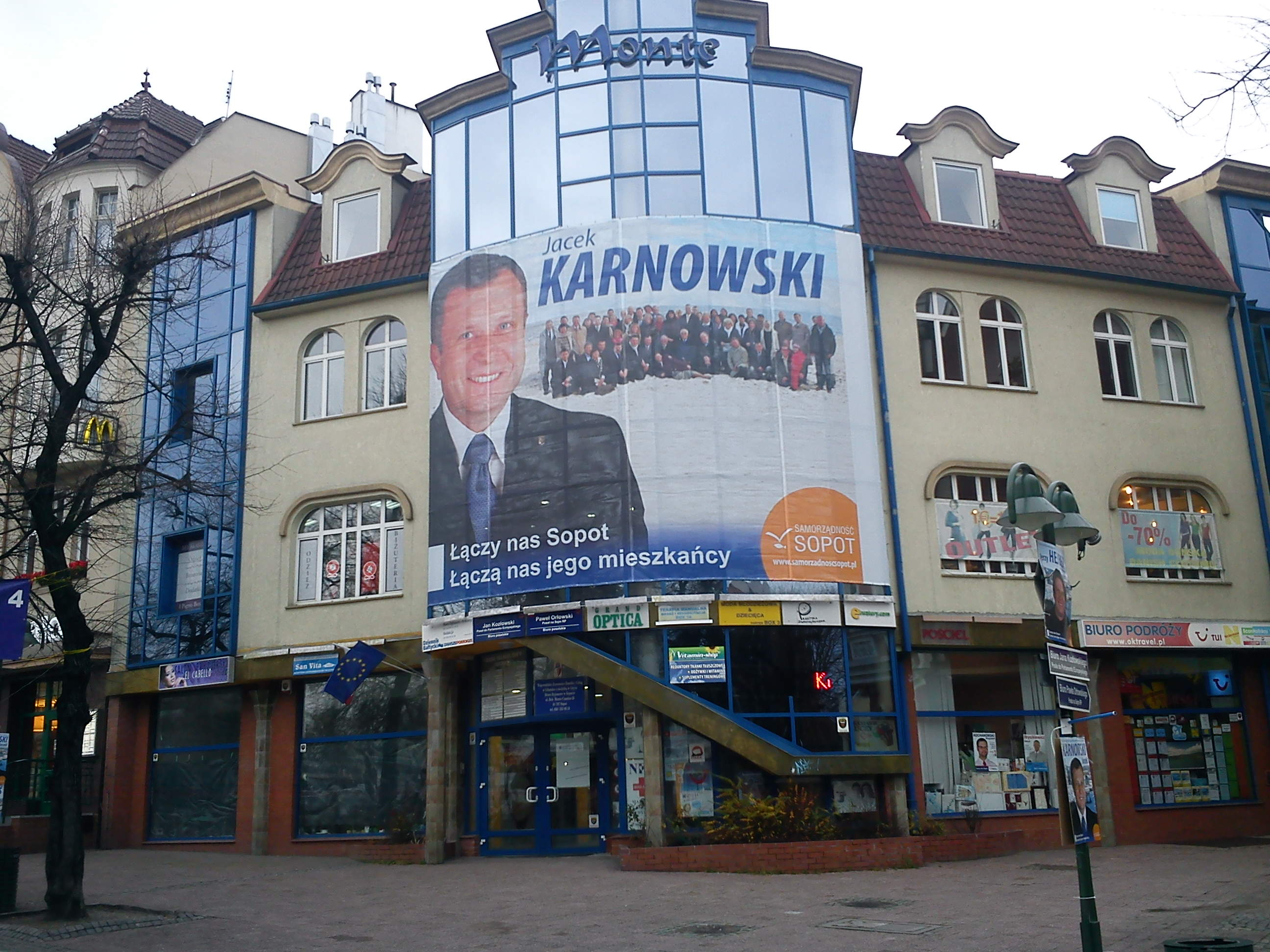 Sopot, ul. Bohaterów Monte Cassino 25, Dom Handlowy „Monte”. Kampania wyborcza Jacka Karnowskiego w trakcie wyborów samorządowych w 2010 r.